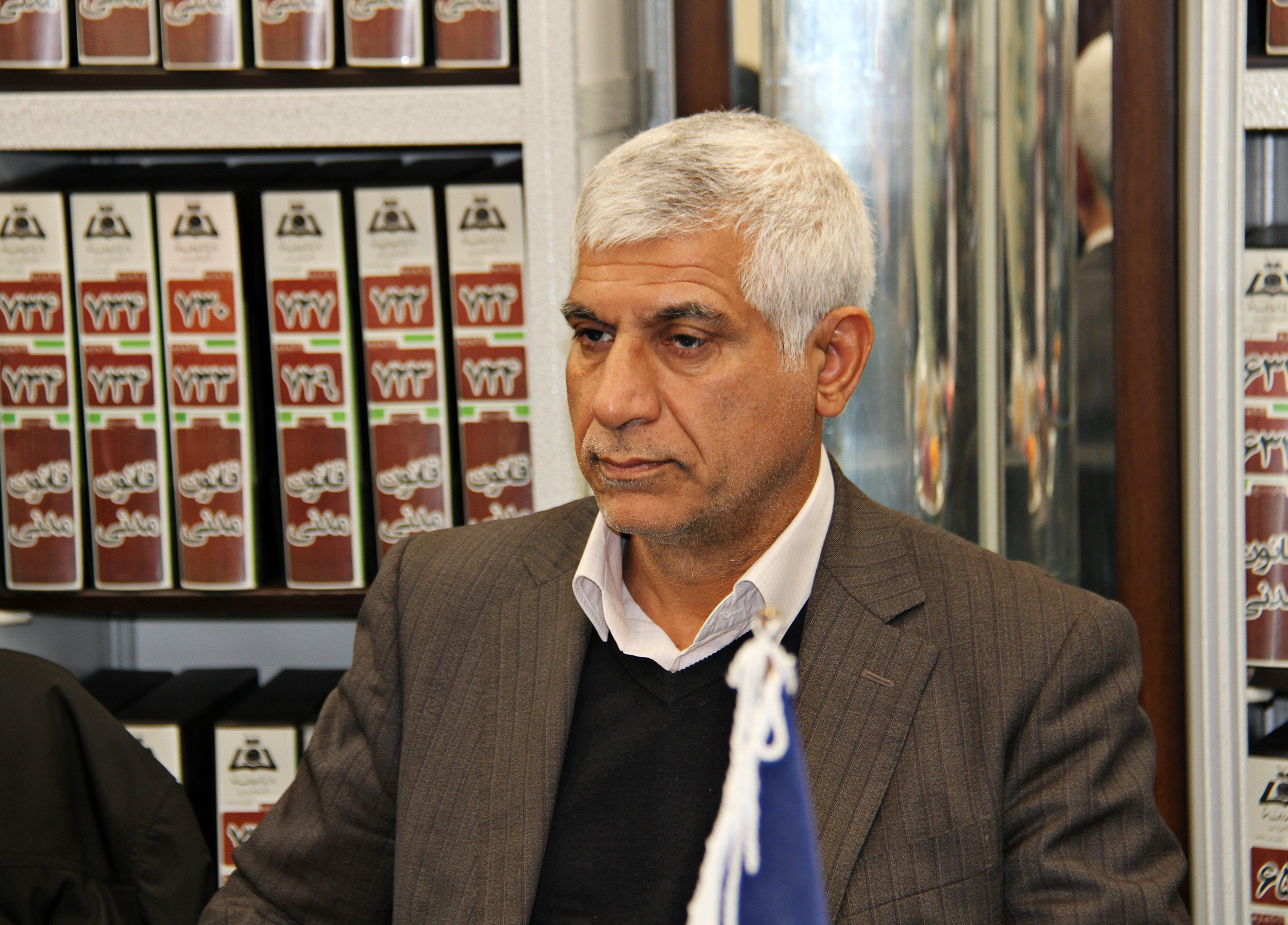 علی اسلامی پناه در مرکز پژوهشی دانشنامه های حقوقی علامه